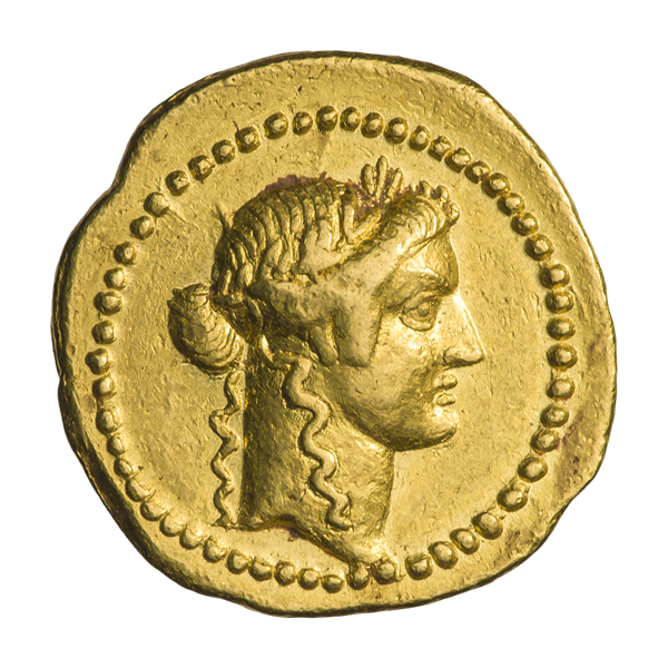 Ауреус. Ок. 42 г. до н.э. Рим. Монетарий Гай Вибий Вар. Аверс. Голова Аполлона в лавровом венке, вправо. Точечный ободок.